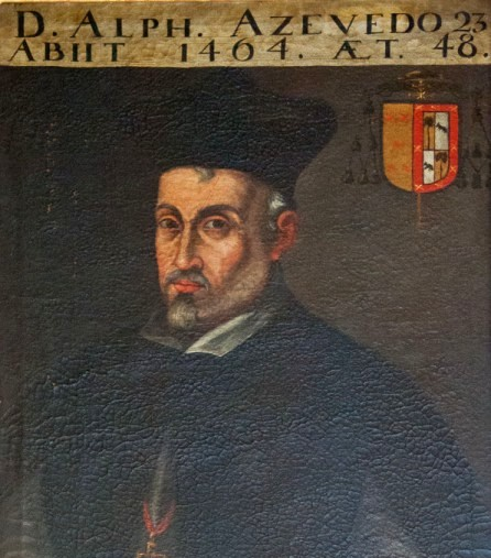 ALONSO DE FONSECA Y ACEVEDO (1460-1464), o Fonseca el Joven